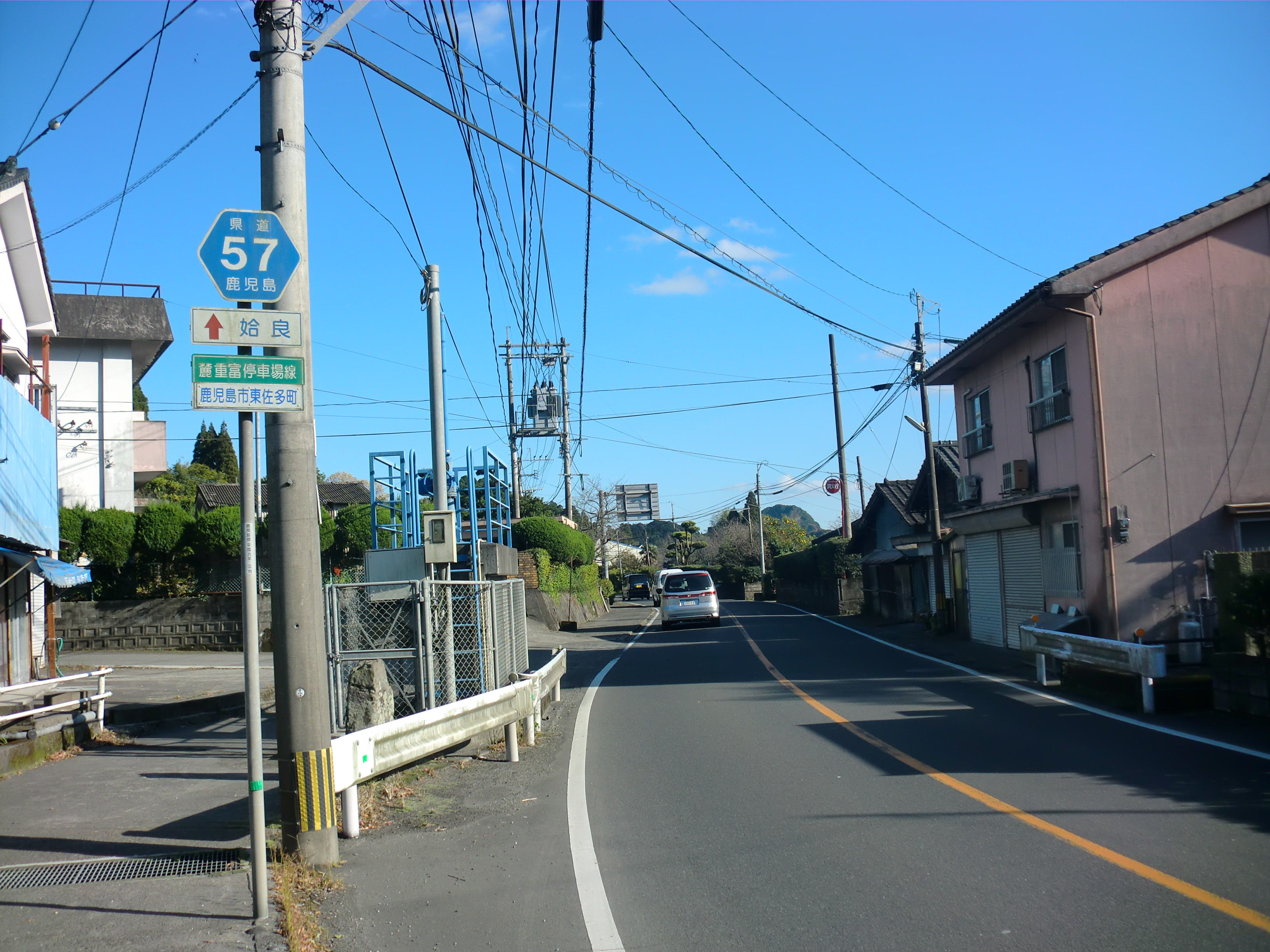 鹿児島県道57号麓重富停車場線。鹿児島市東佐多町で撮影